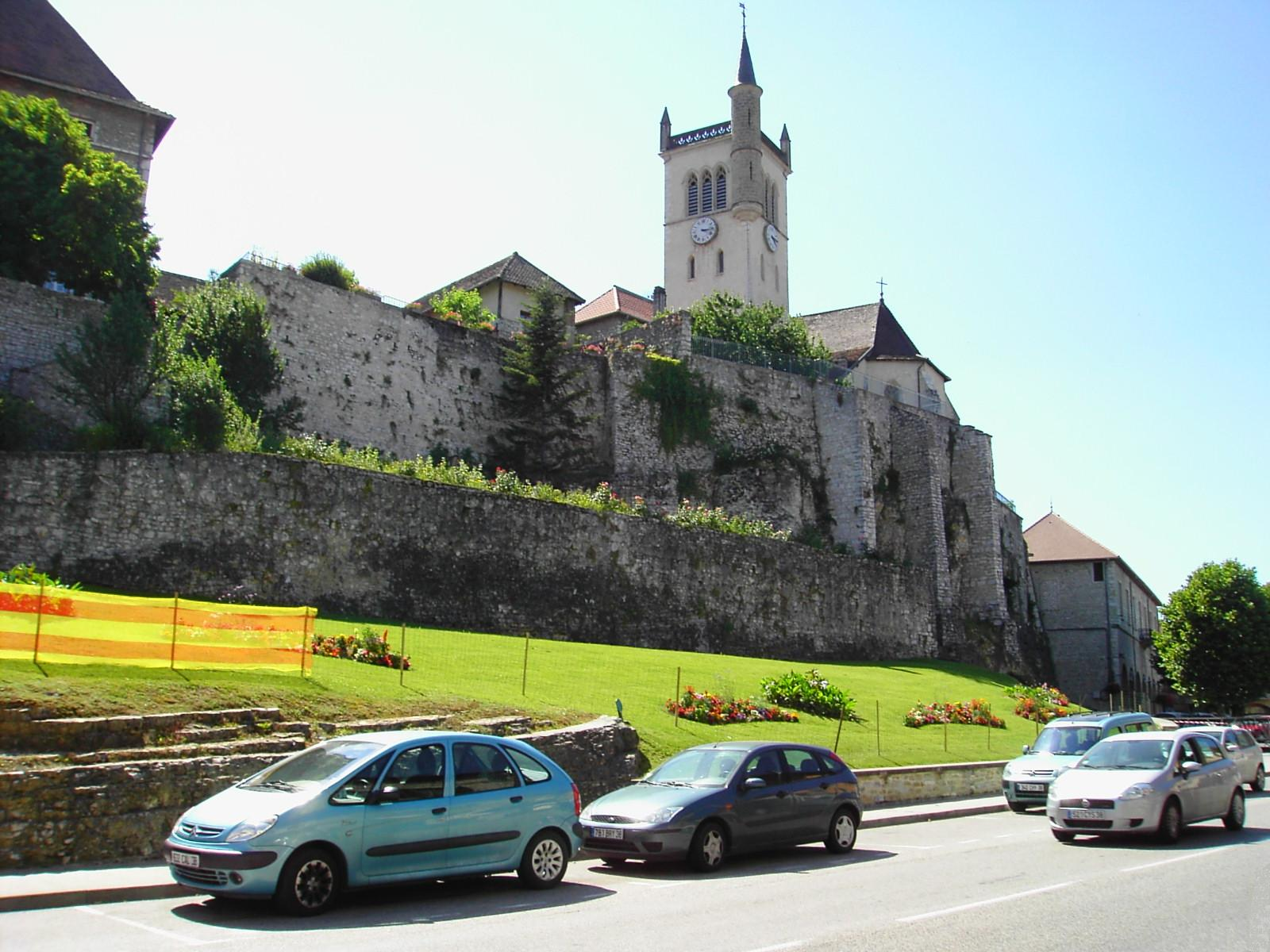 Morestel - Isère